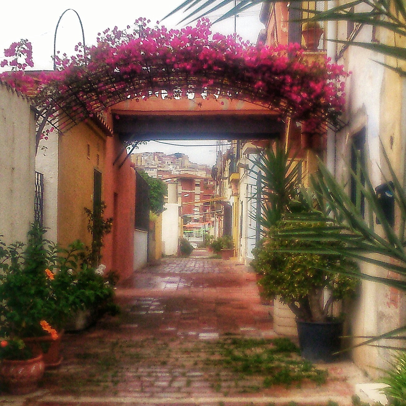 Carrer d'Aiguafreda, barris de bugaderes d'Horta